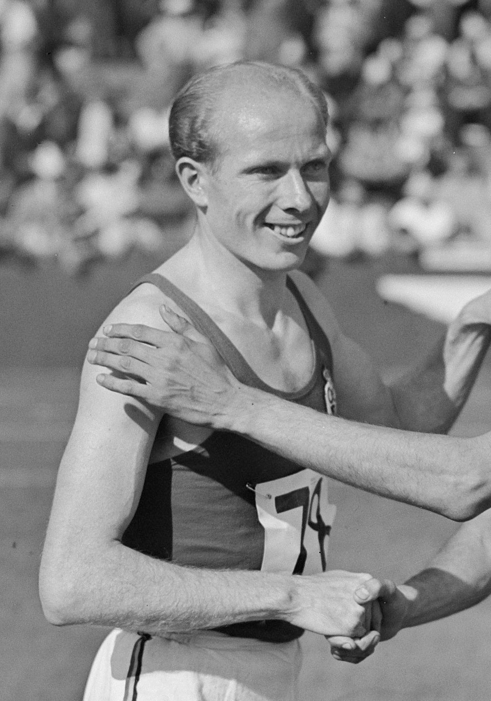 Atletiekgasten Reiff, de Belg Gaston Reiff